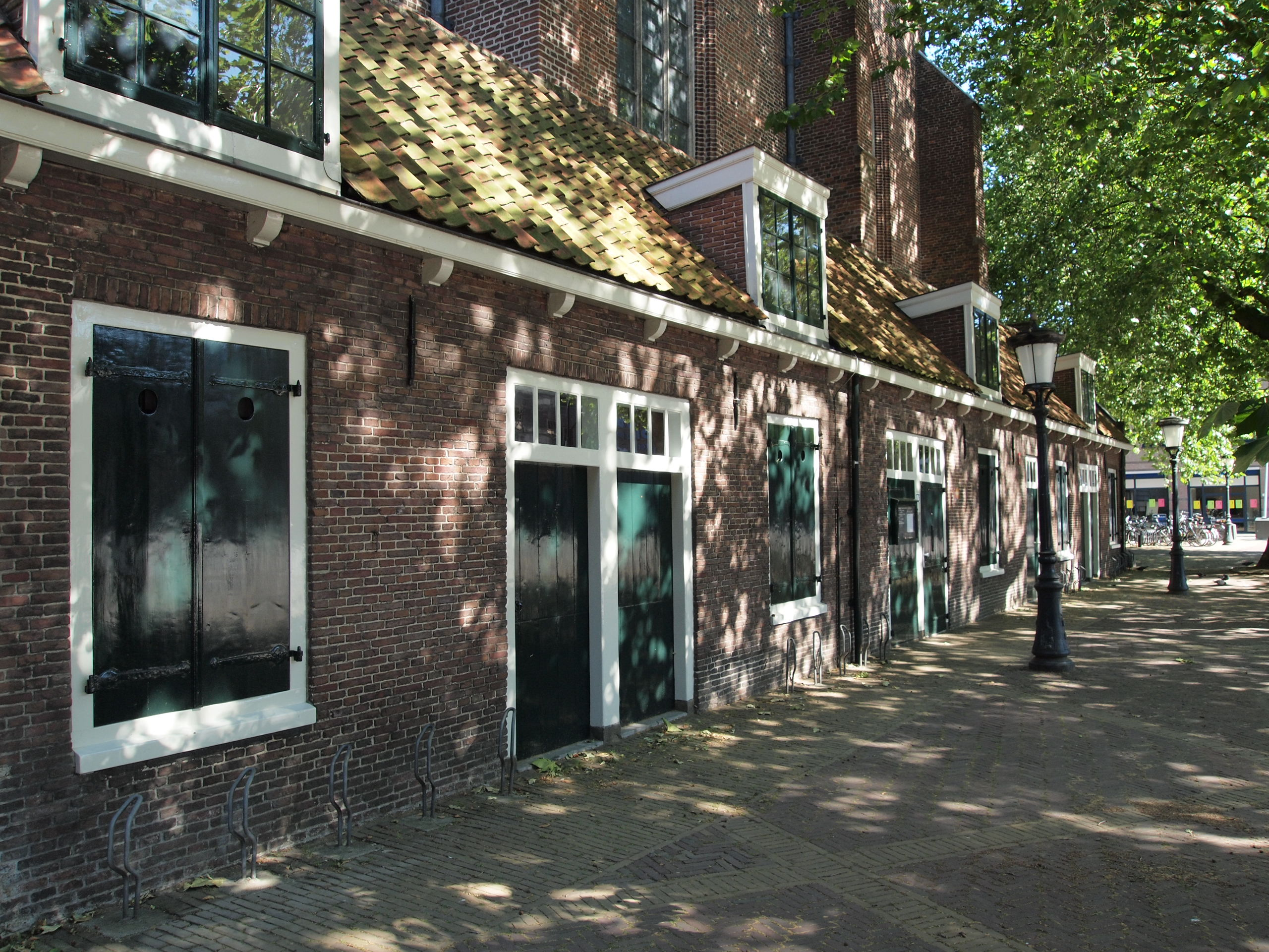 Sint Jacobsstraat 171, Utrecht